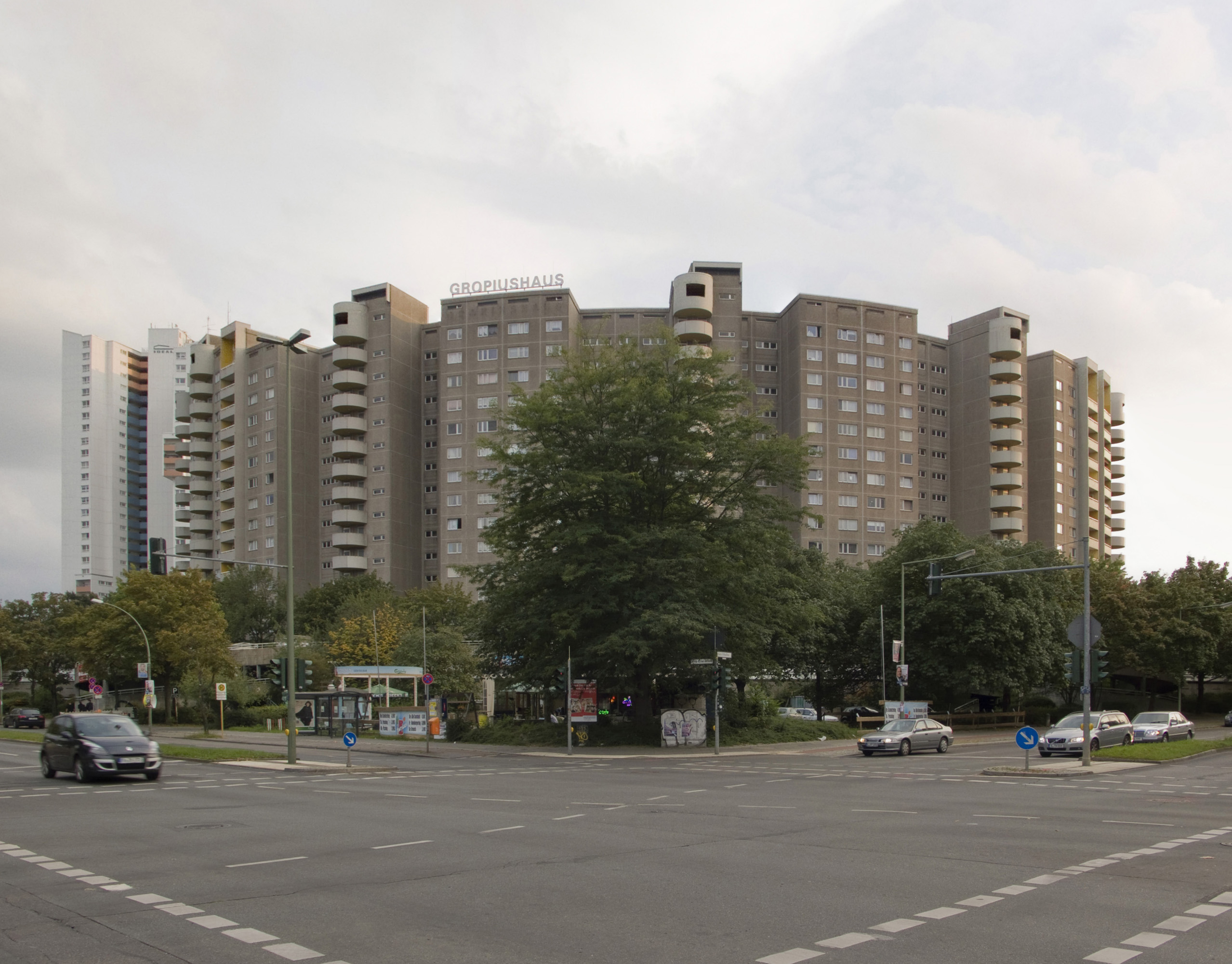 Gropiushaus, Lipschitzallee Ecke Fritz-Erler-Allee , Gropiusstadt, Britz-Buckow-Rudow, Berlin-Neukölln, Zustand Sept. 2011